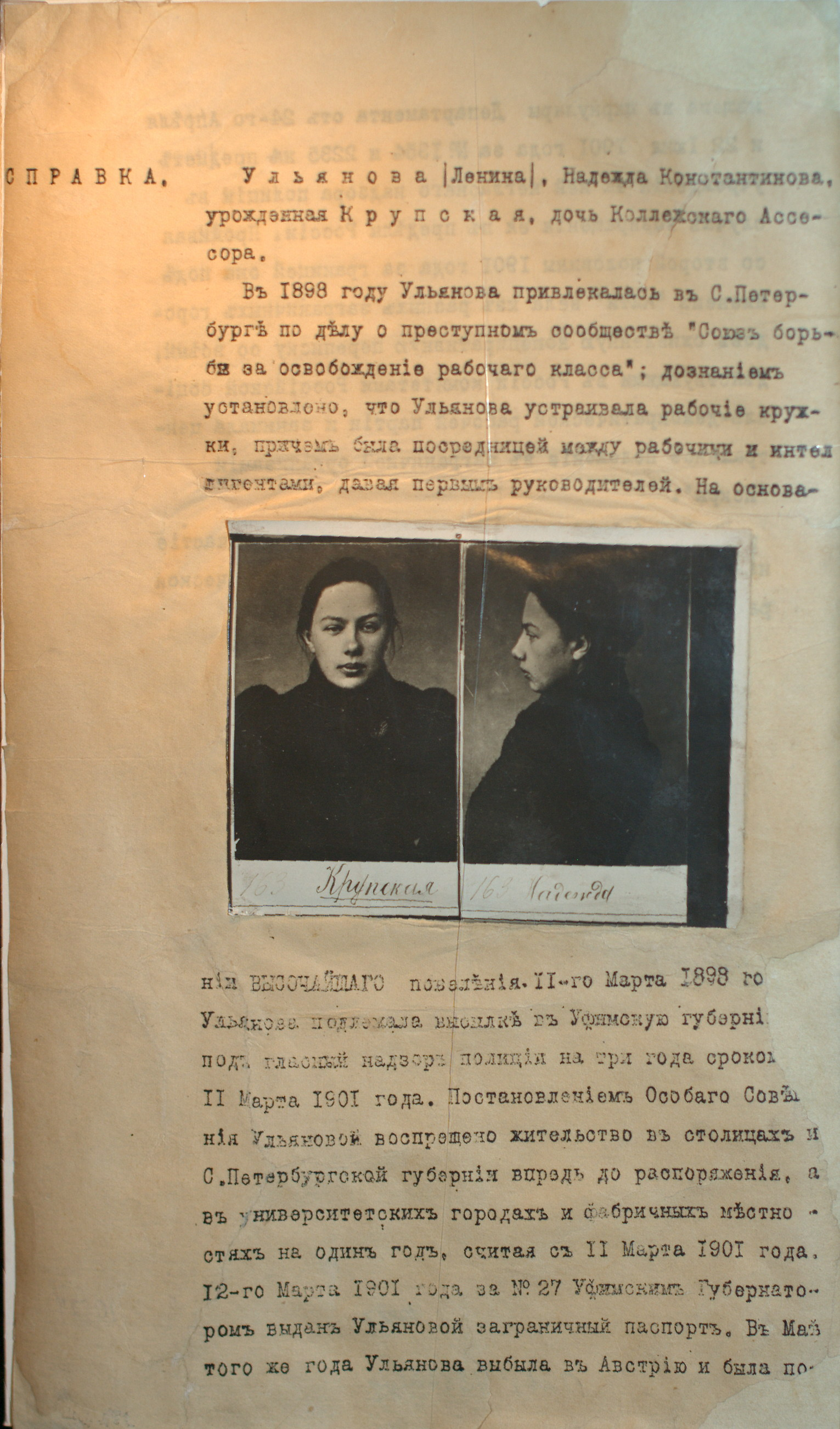 Template:Справка Крупской